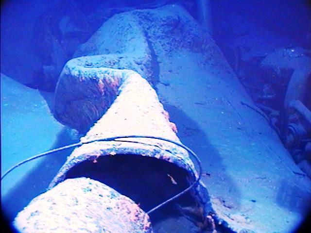 shipwreck underwater